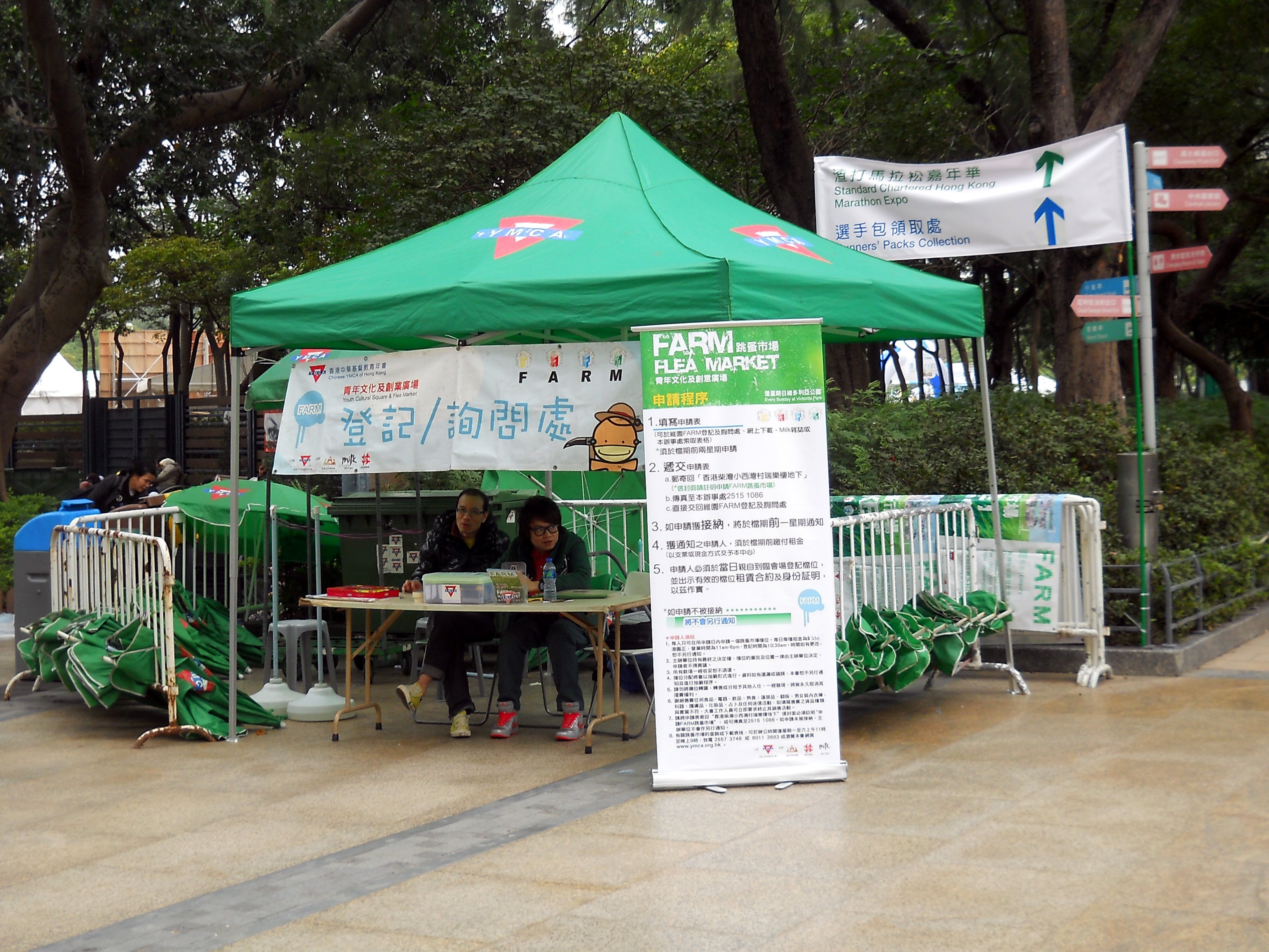 中文（香港）: 香港中華基督教青年會於週日在維多利亞公園舉辦的FARM跳蚤市場及青年文化廣場